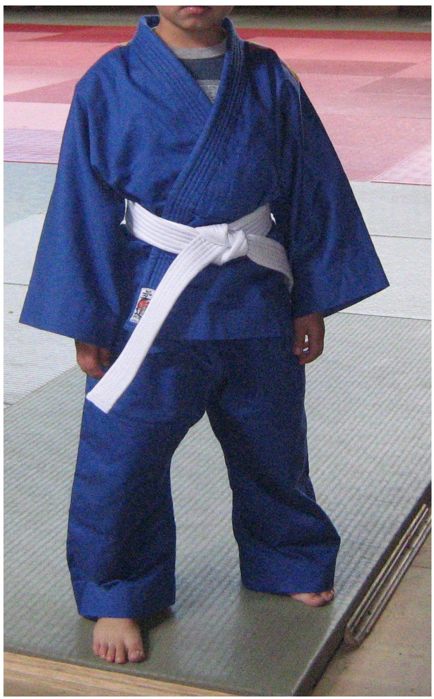 Judogi infantil de color Azul con obi blanco, tomada el la Liga de Judo de Bogotá